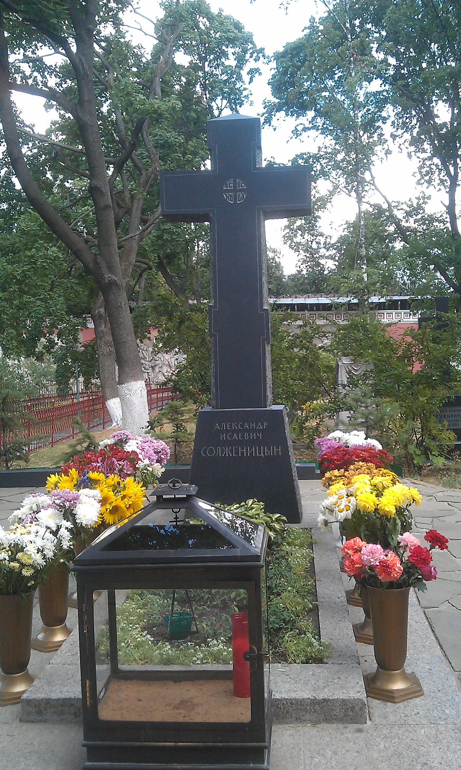 могила А. И. Солженицына на кладбище Донского монастыря